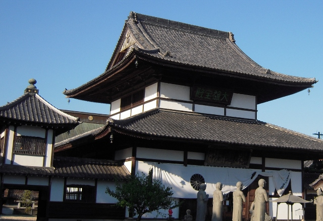 大慈寺（熊本市南区）